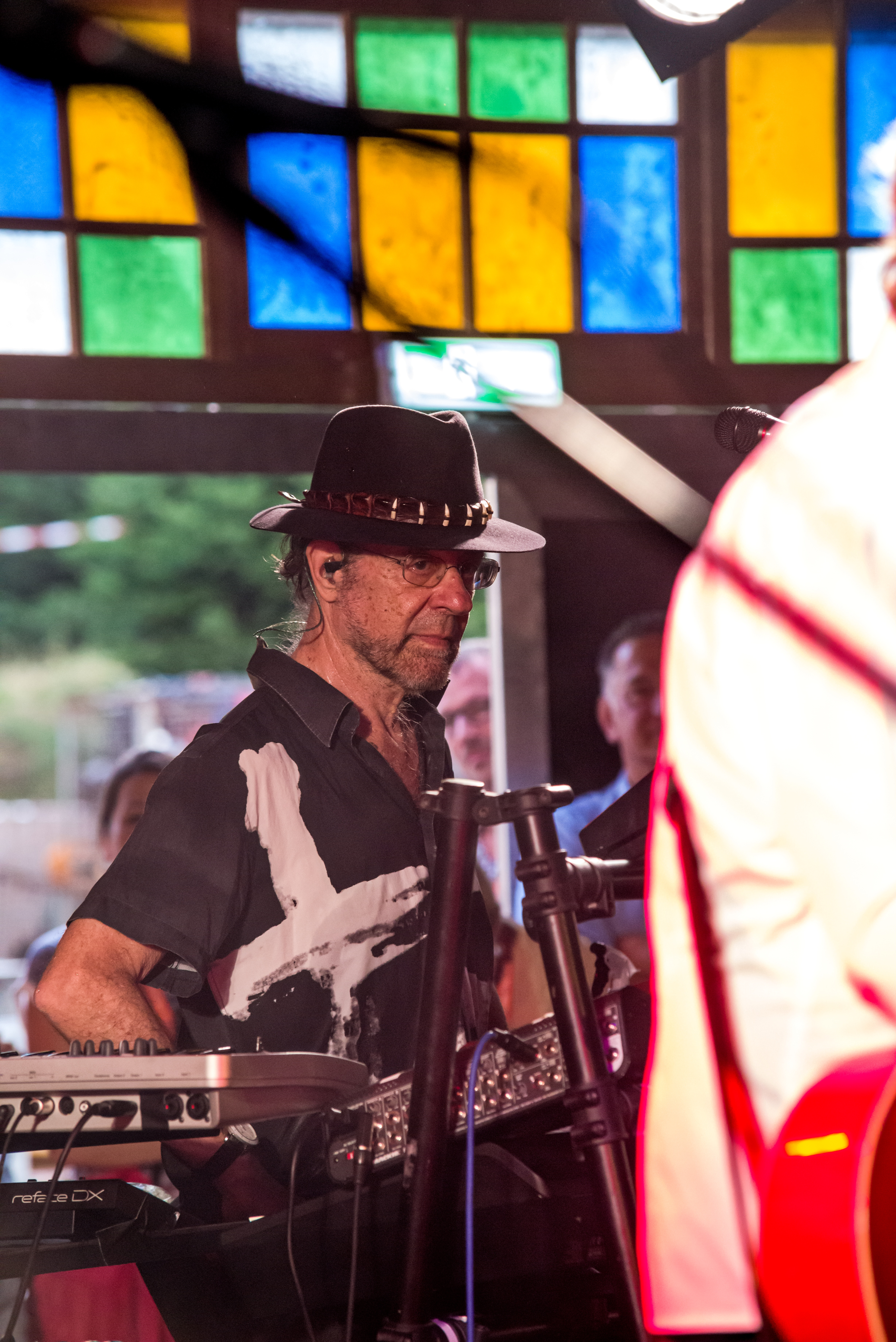 Bilder vom Zelt Musik Festival 2017 in Freiburg im Breisgau